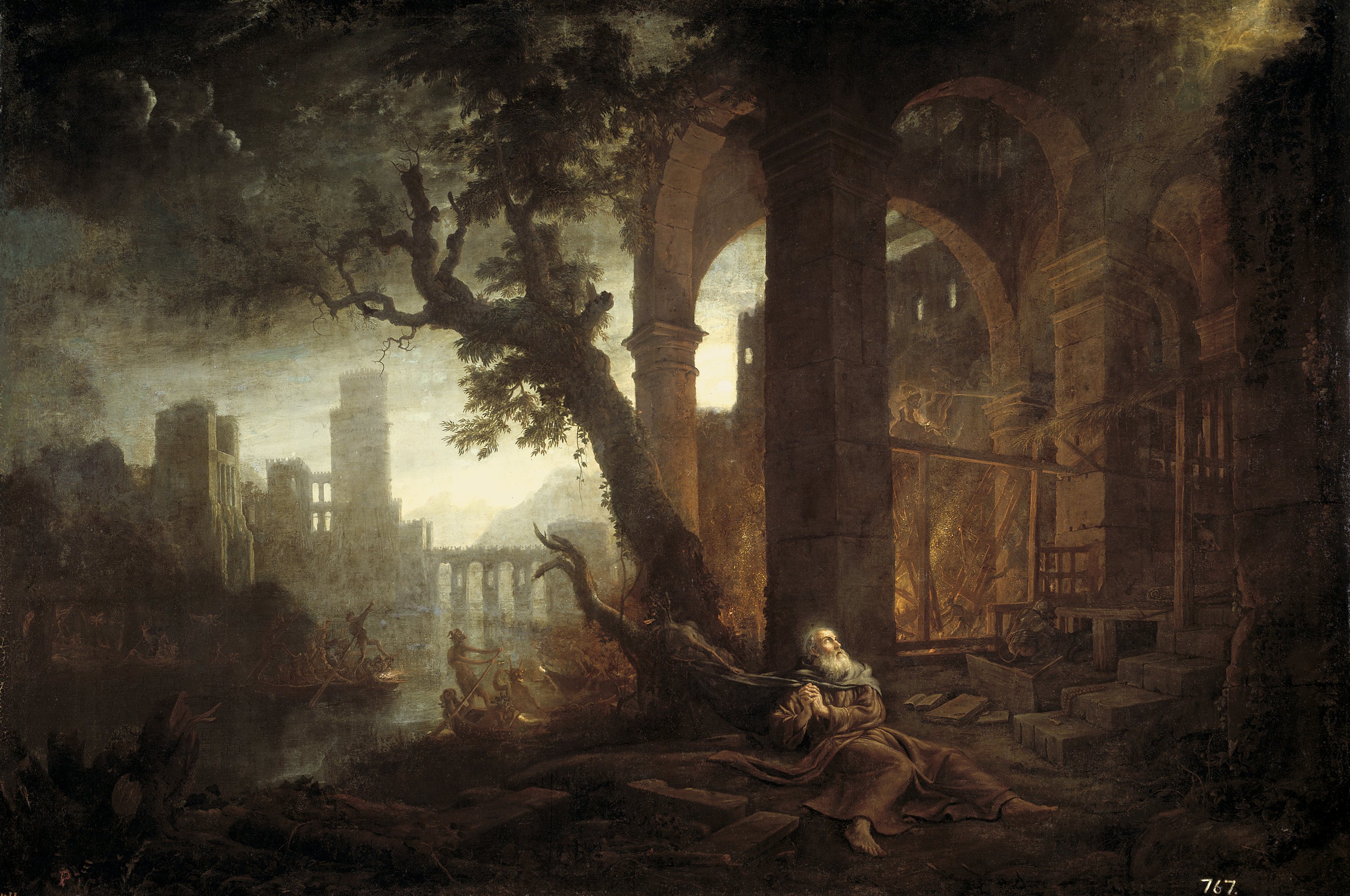 Paisaje con las tentaciones de San Antonio (1635-1638), Claude Lorrain, Museo del Prado, Madrid.